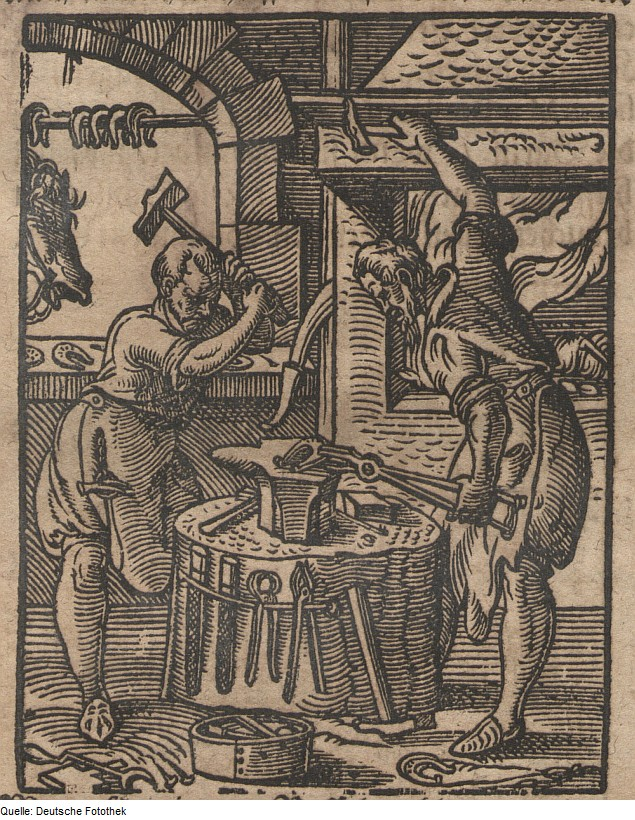 Original image description from the Deutsche Fotothek Ständebuch & Beruf & Handwerk & Schmied & Hufeisen